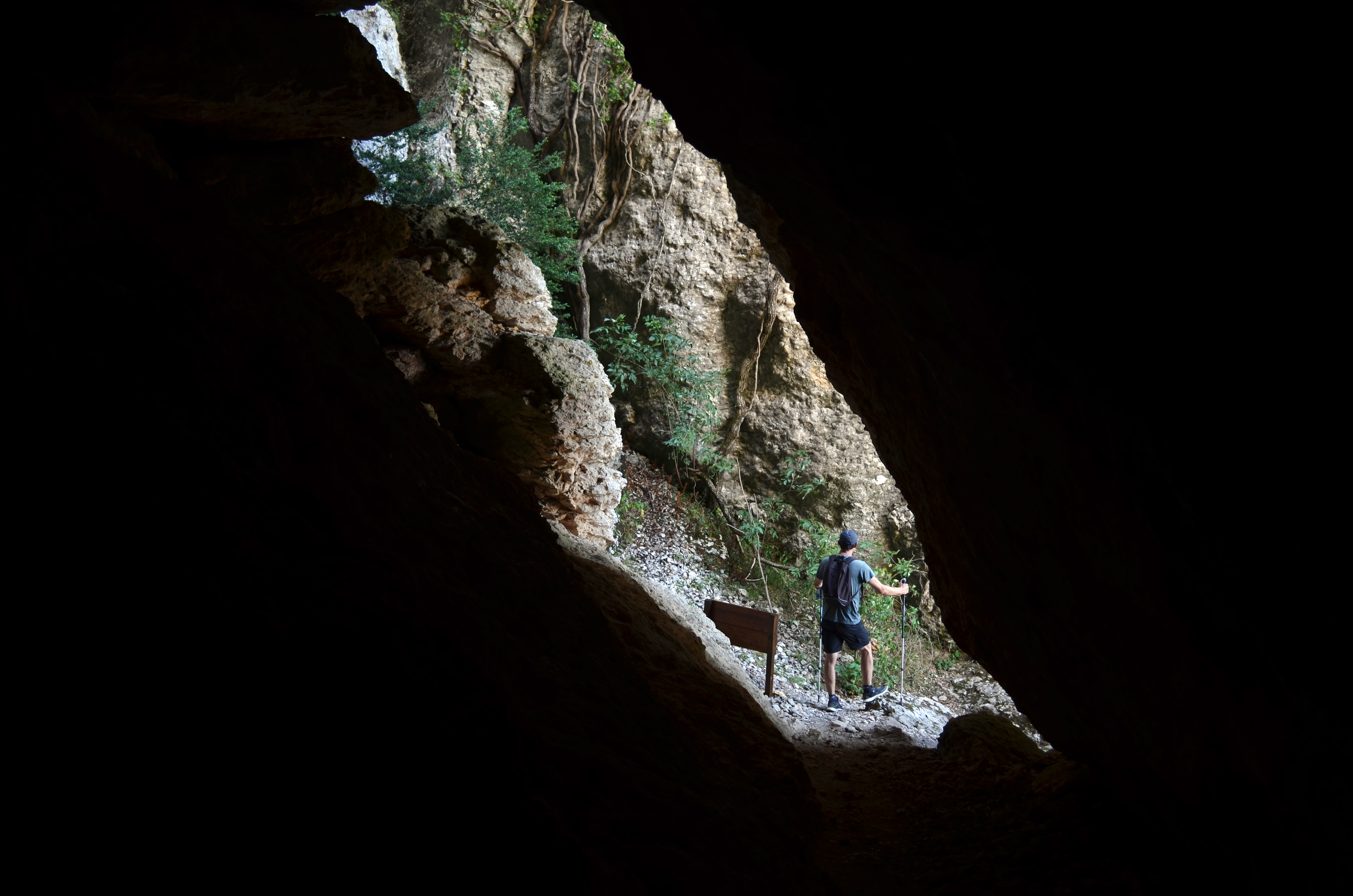 Salida del Ojo de Ollo en el lado del descenso al valle, o sureste, y un senderista saliendo de él; foto tomada desde el interior de la cueva.